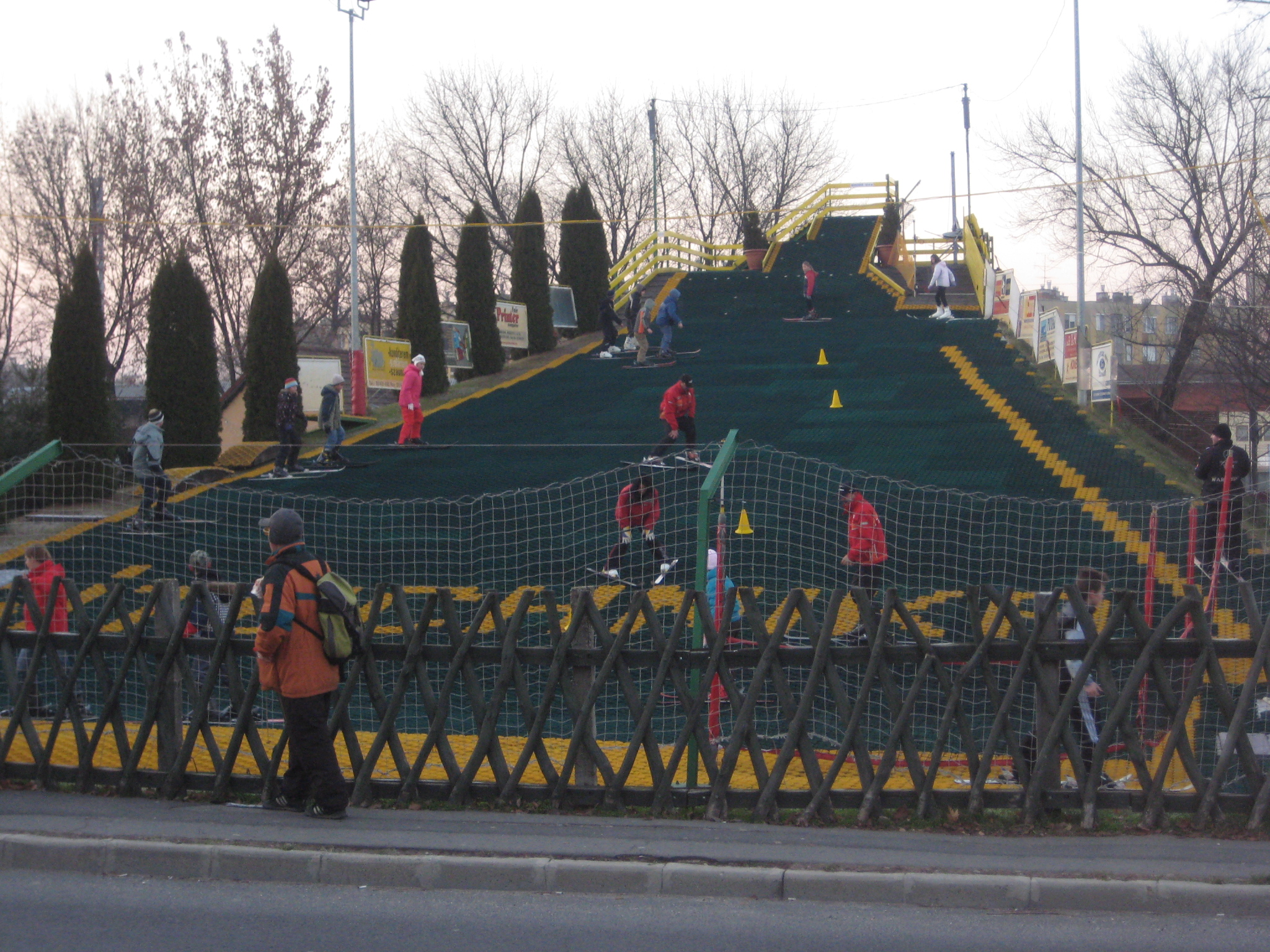 Dorogi Sícentrum.